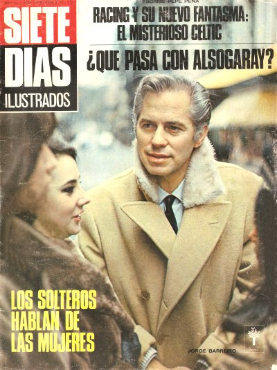 El actor argentino Jorge Barreiro (1930-2009) en la tapa de la revista "Siete Días Ilustrados", edición del 5 de septiembre de 1967. Dominio público por caducidad de los derechos de autor en Argentina, ley 11723.